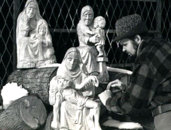 Stanisłąw Żyrek, rzeźbiarz przy pracy w swojej pracowni, Prabuty 1978, zdjęcie-archiwum rodzinne